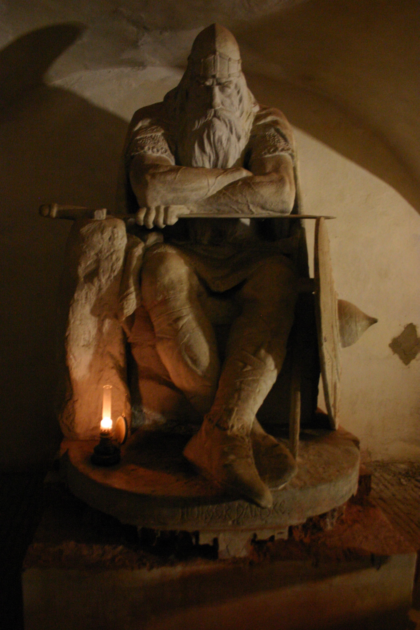 Holger in Kronborg Castle in Helsingør, Denmark